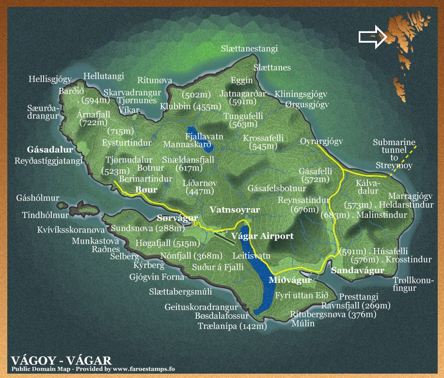 Vágar, Faroe Islands